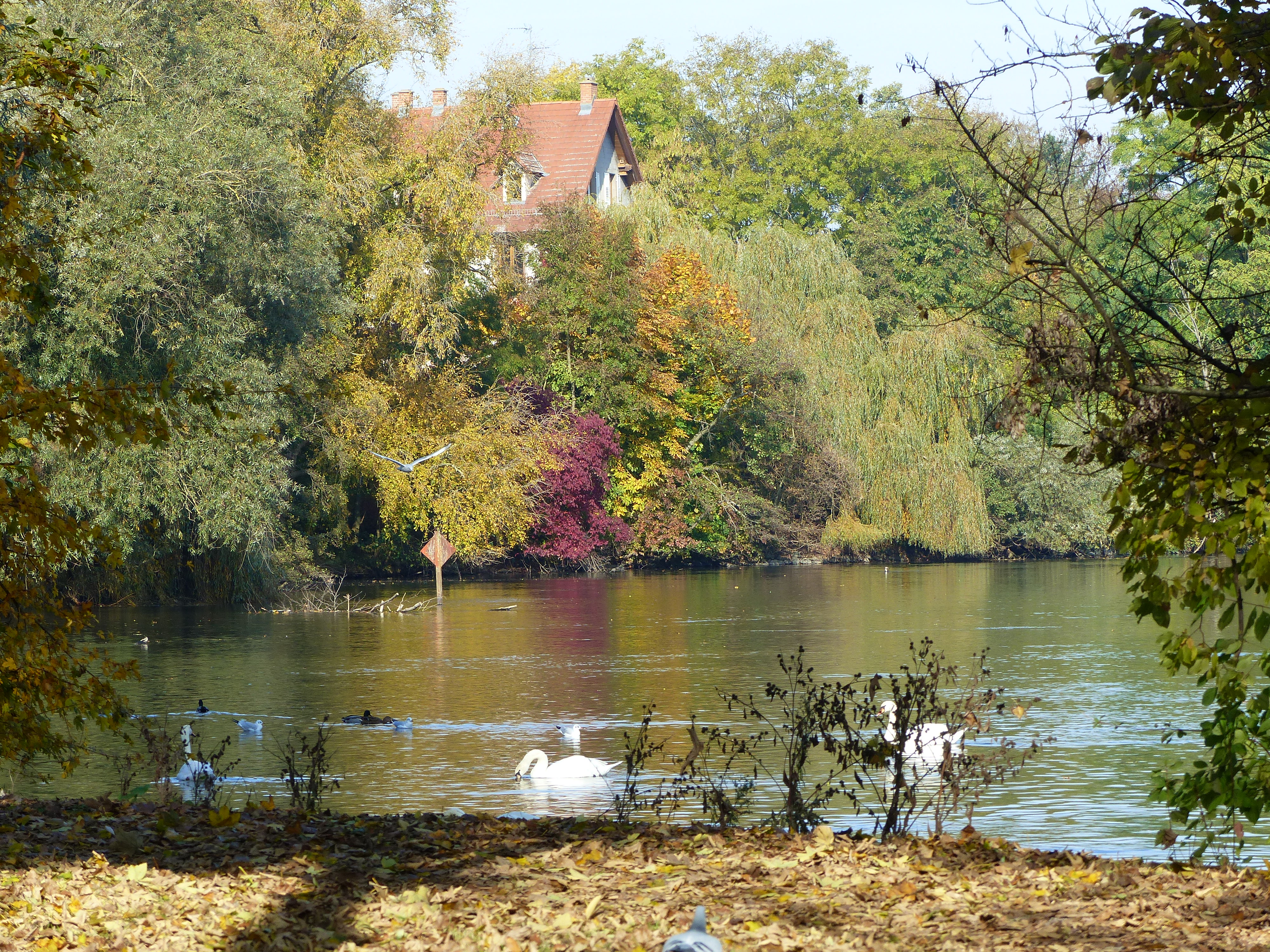 L'Ill dans le quartier de la Montagne Verte à Strasbourg en automne.